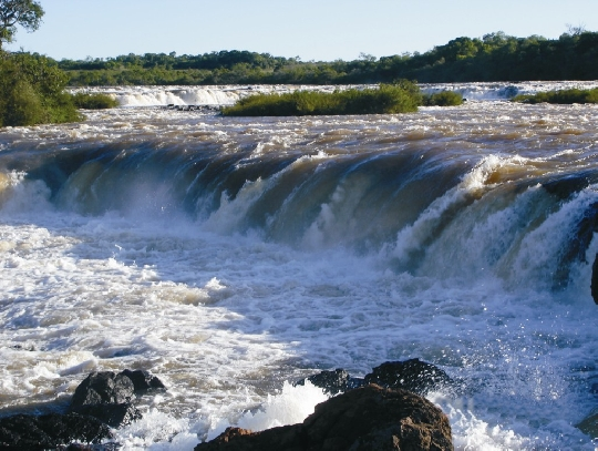 Salto do Pirapó. Localizado no rio Ijuí.